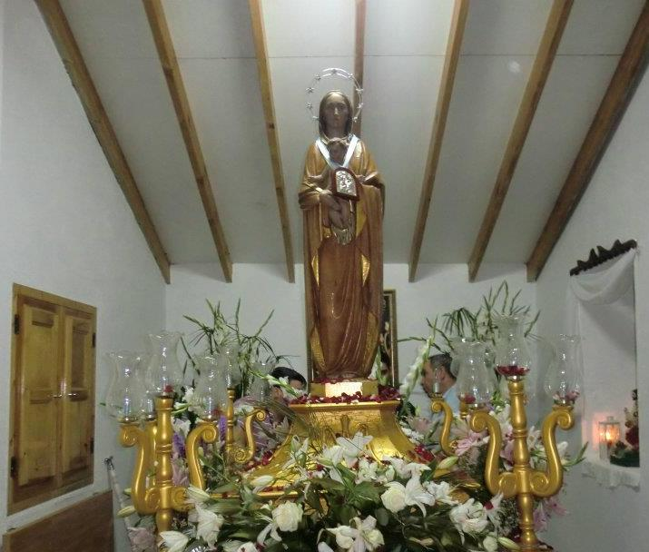 Ntra. Sra. de la Esperanza. Patrona del Barrio del Progreso